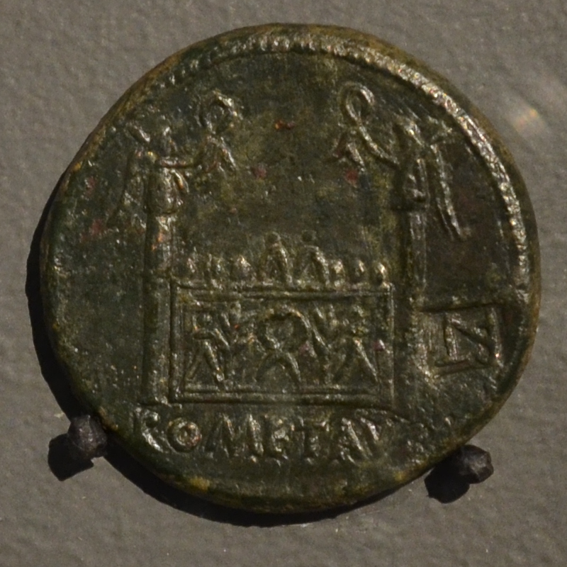 Sesterce d'Auguste à l'autel des Trois Gaules, Musée des Beaux-Arts de Lyon. Atelier de Lyon, 9-10 - 14 après J.-C. Laiton. D/ C CAESAR AVGVSTVS DIVI PATER F PATRIAE R/ ROM ET AVG Lyon musée des beaux-arts 1991-2